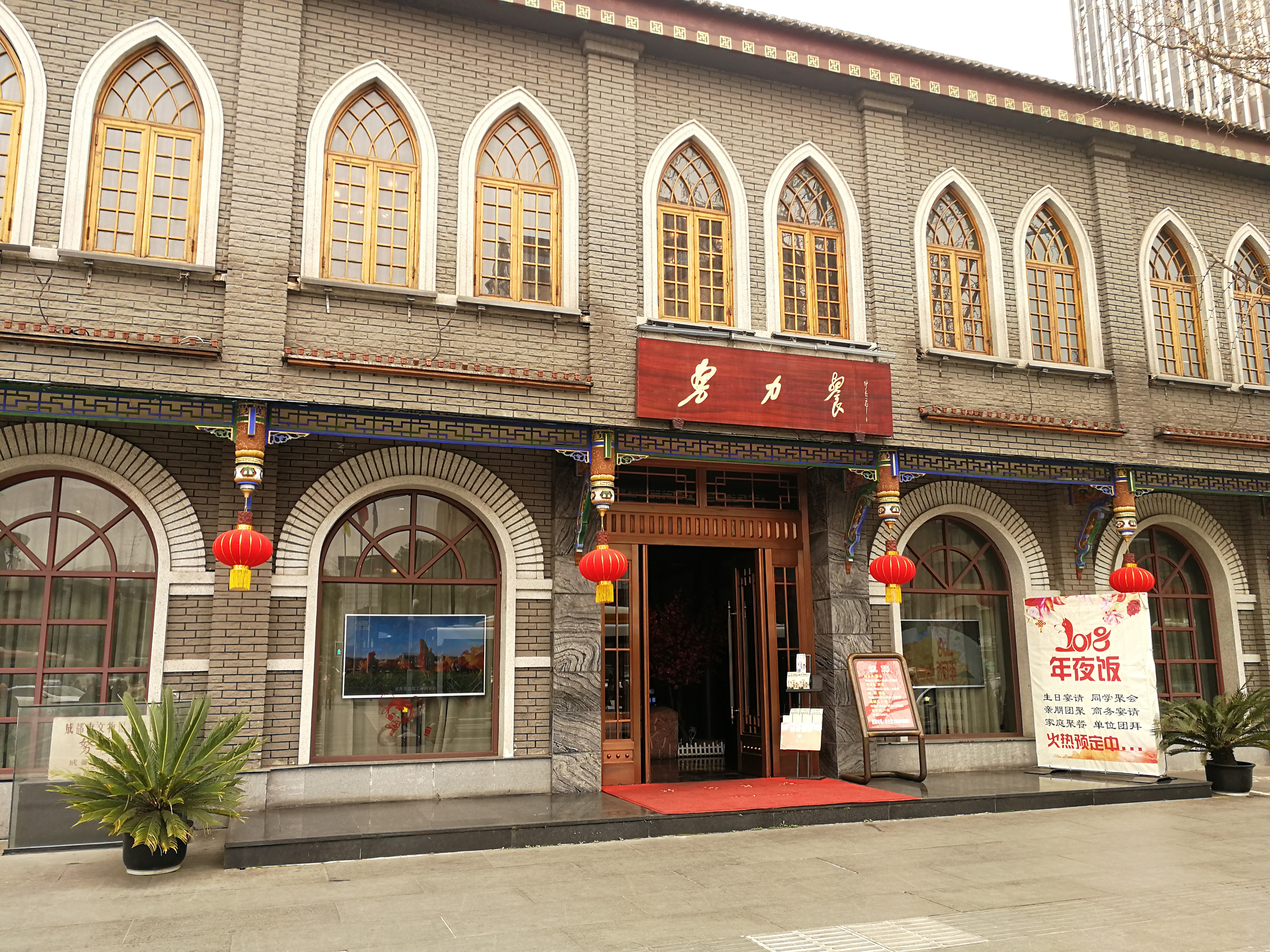 成都市青羊区的一间餐厅，成都市文物保护单位